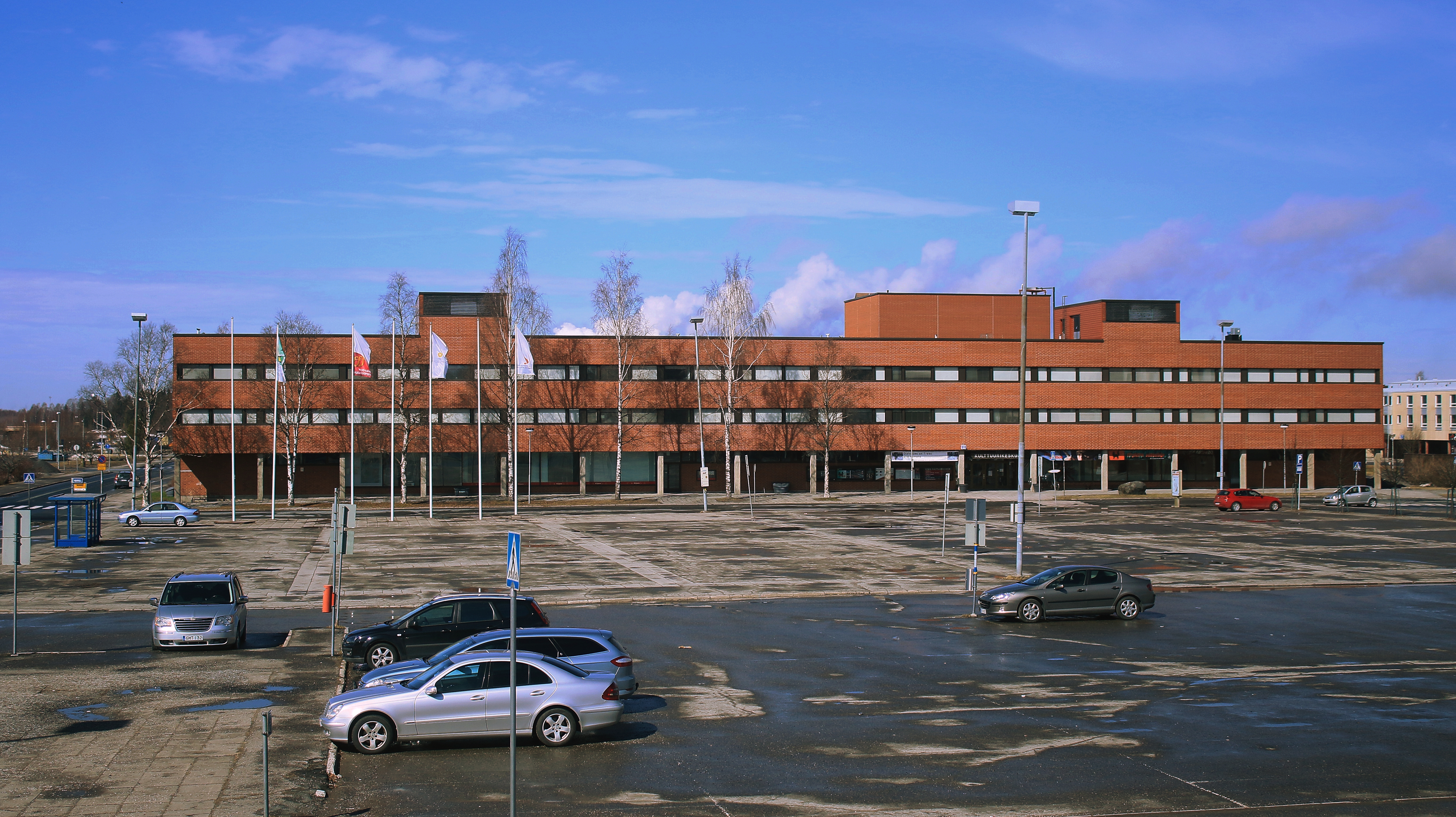 kulttuurikeskus